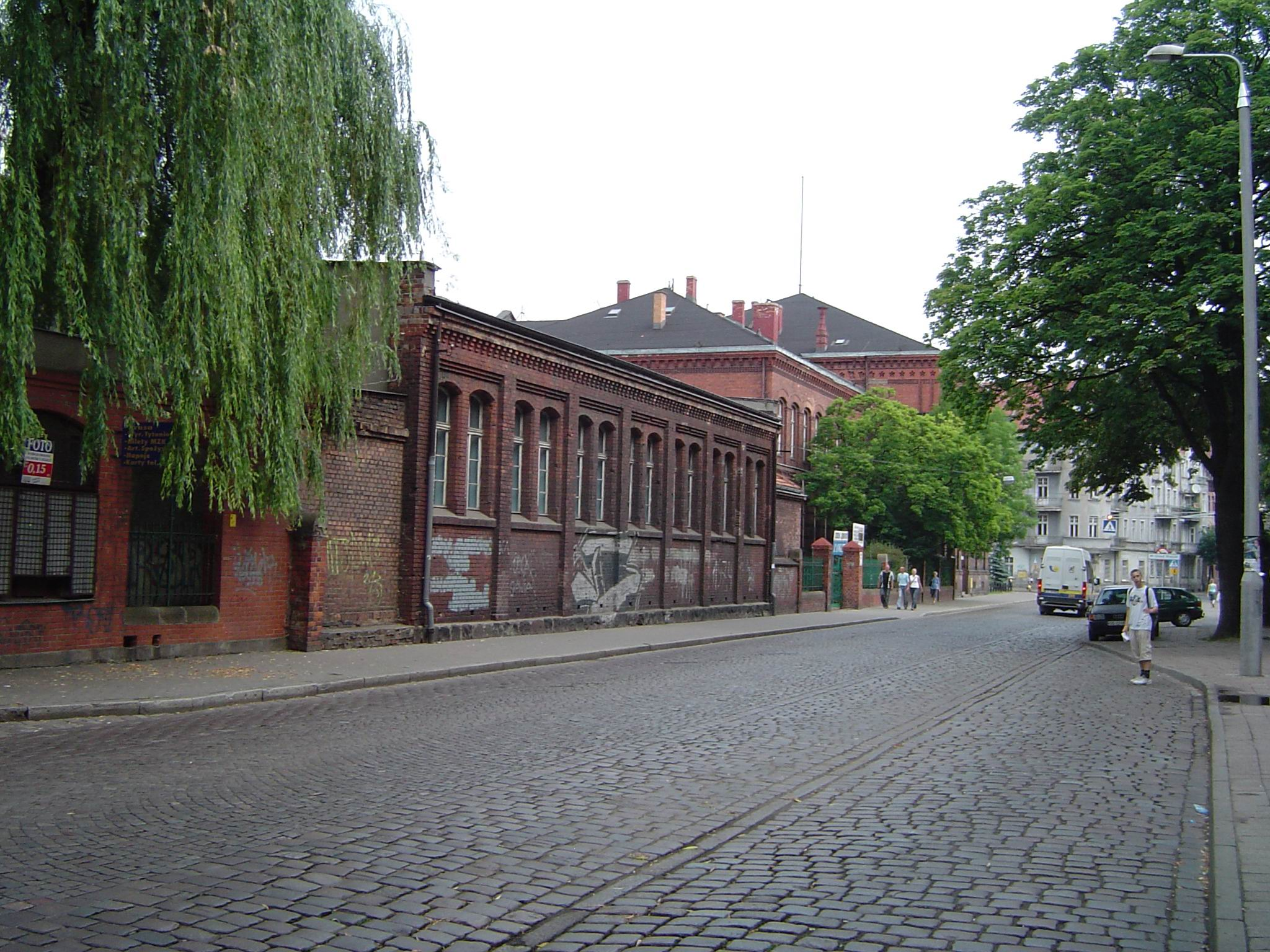 I Liceum Ogólnokształcące w Grudziądzu